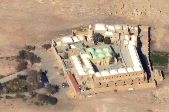 נבי מוסא